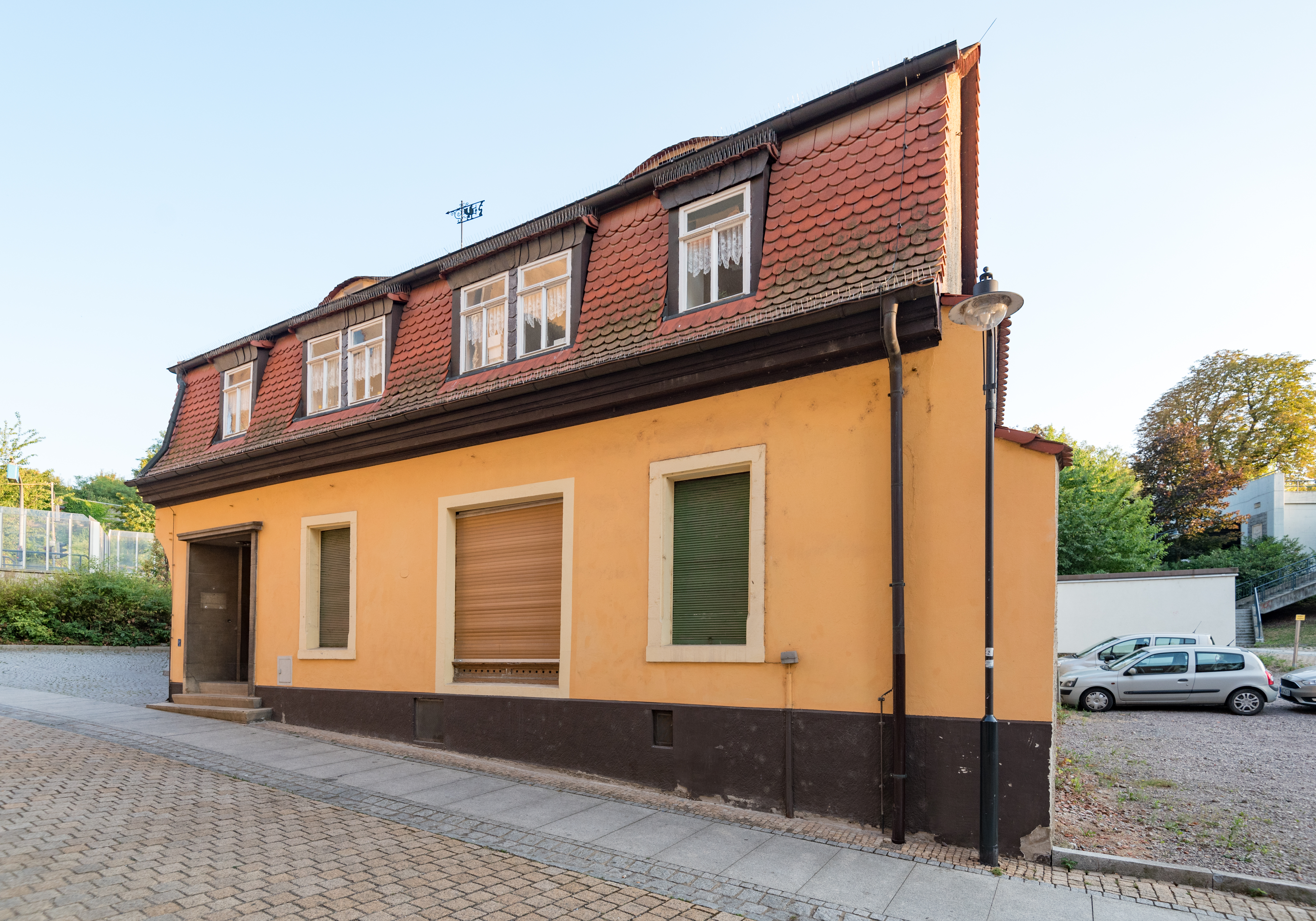 Weißenfels, Kleine Burgstraße 5